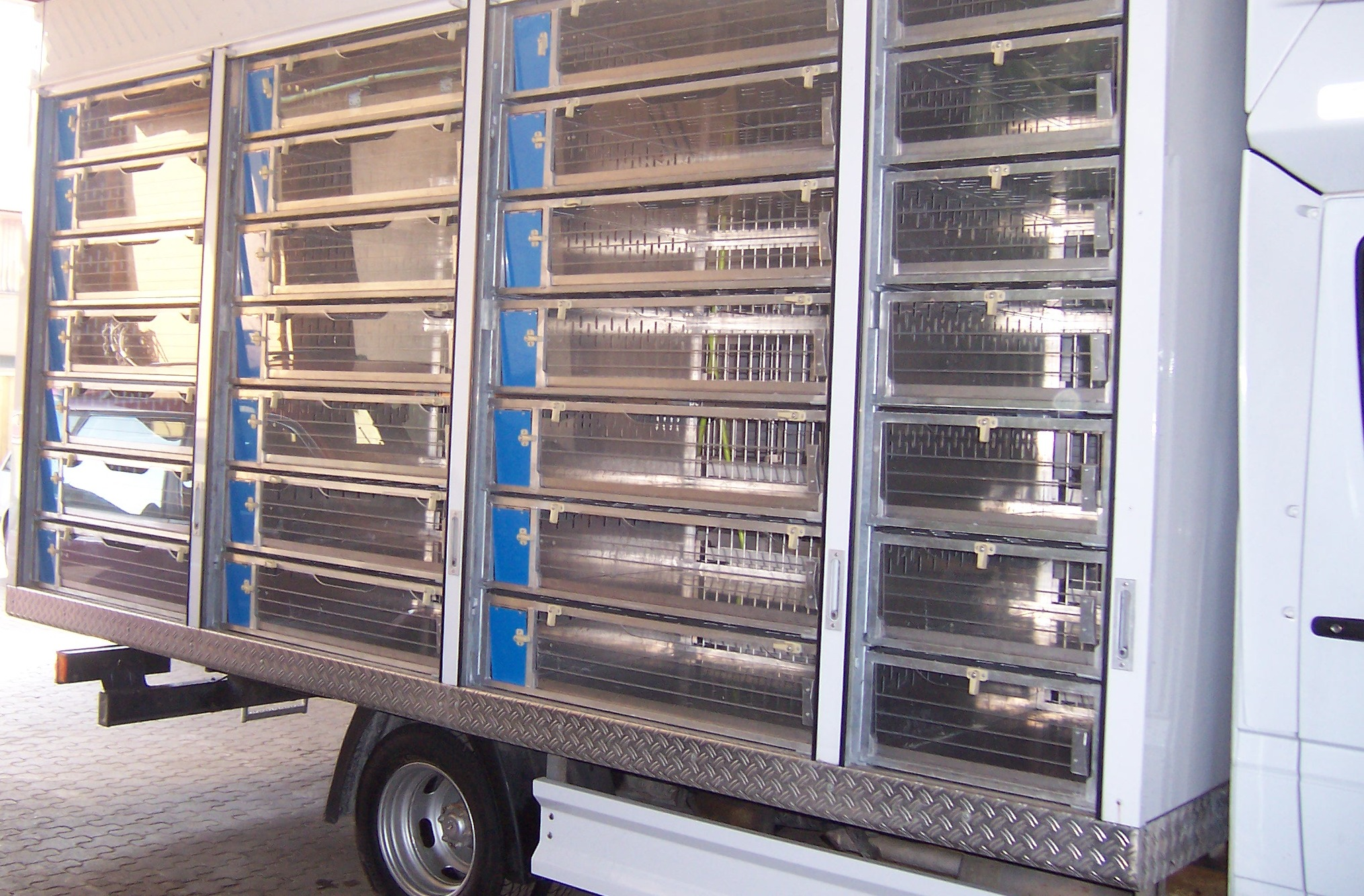 Kabinenexpress